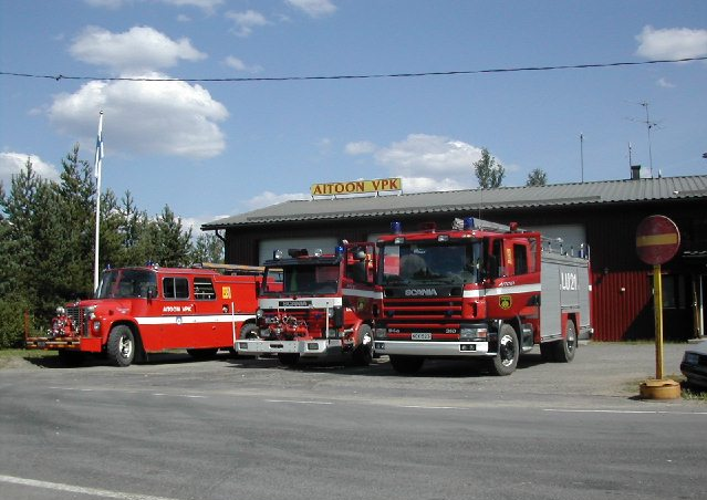 Aitoon VPK